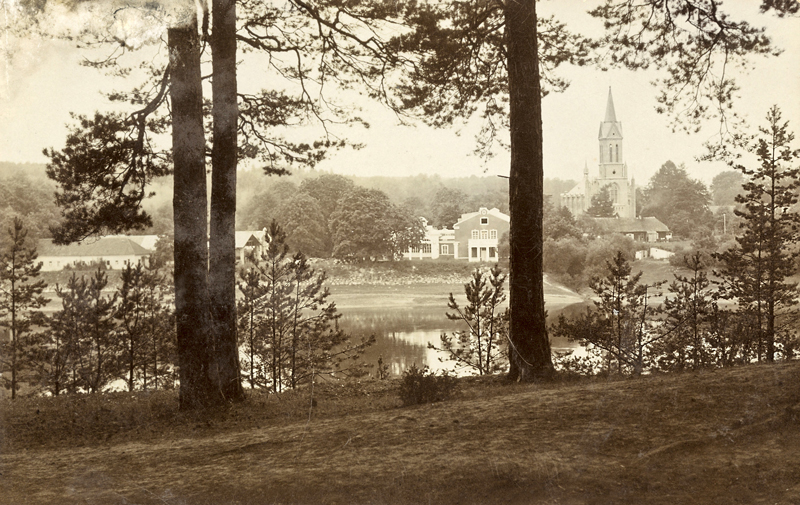 Birštonas, 1930